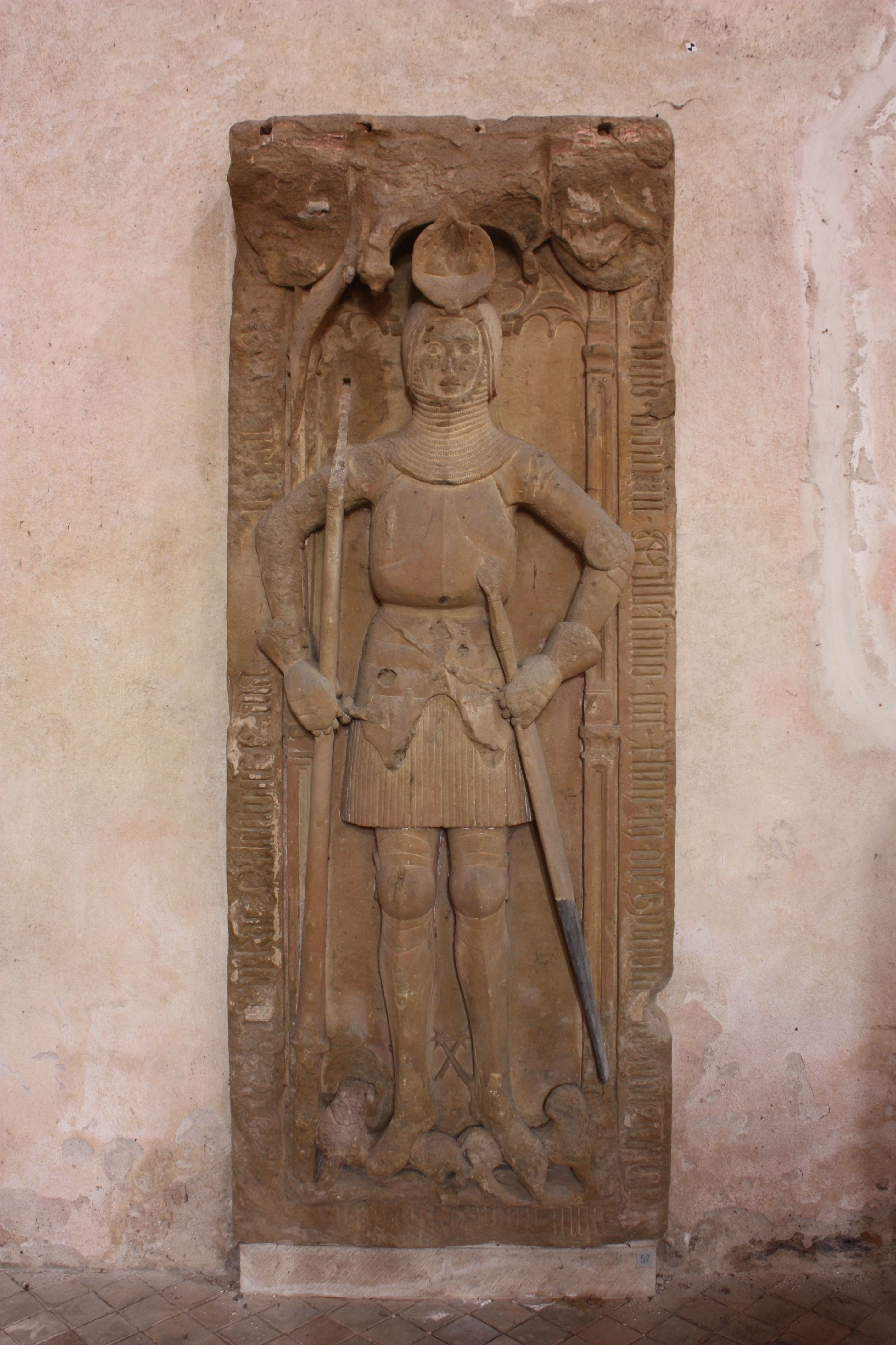 Grabplatte des Grafen Johann IV. von Katzenelnbogen, † 1444 (Nr. 57) in der Basilika des Kloster Eberbach